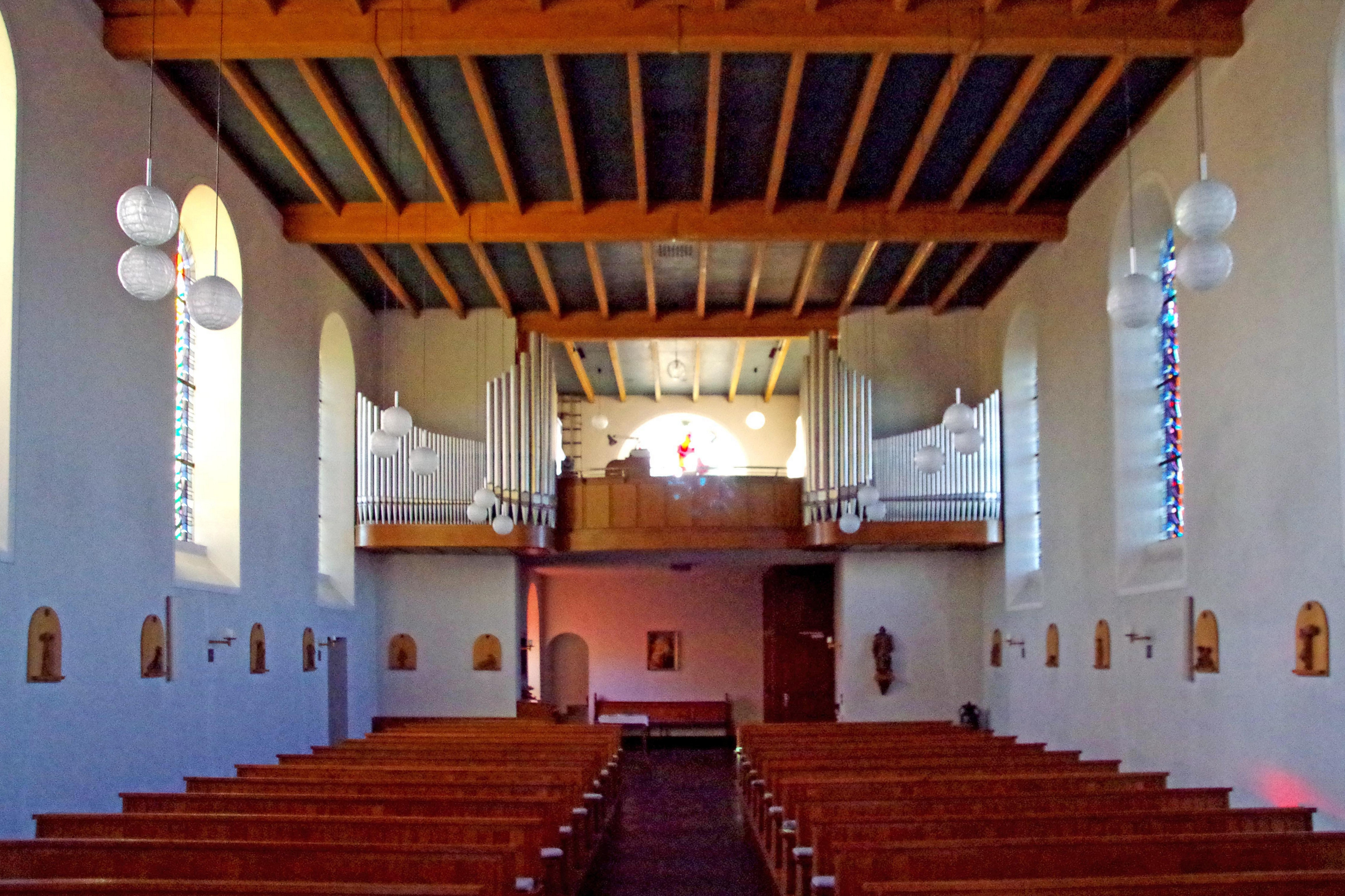 St. Barbara (Rurberg), Innenraum mit Blick zur Orgelempore